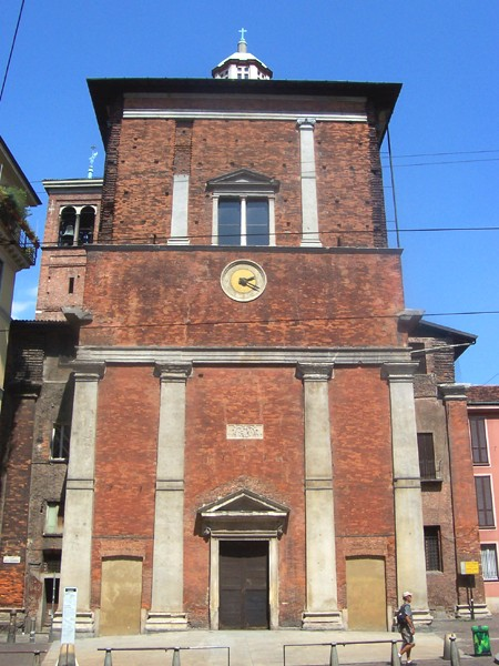 Milano - Basilica di S. Nazaro Maggiore